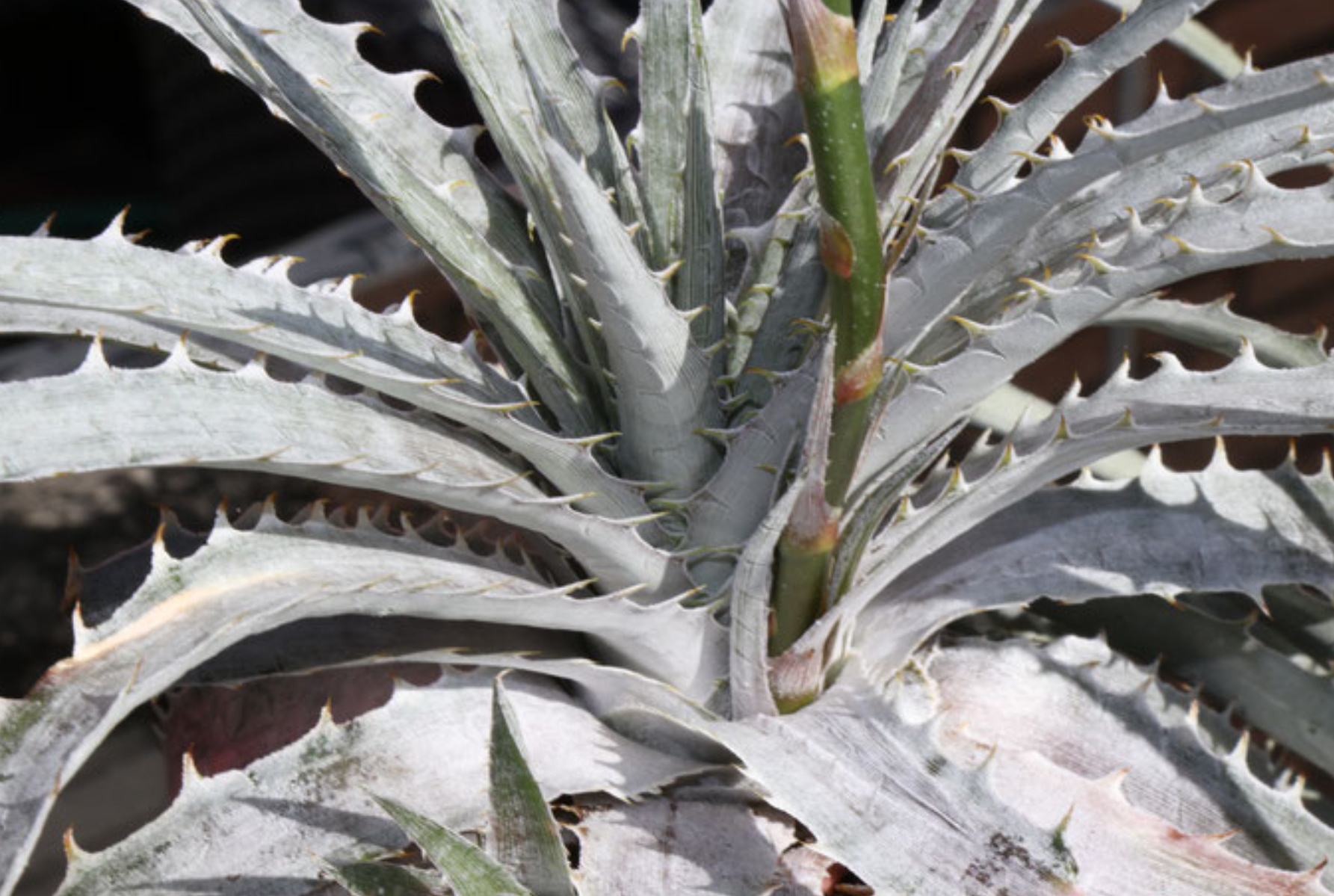 Dyckia seringeriana Holotyp Cachoeira Dourada Minas Gerais Brasil